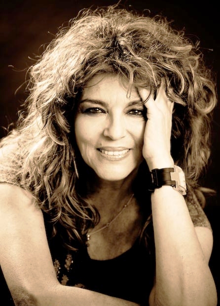 יונה אליאן.